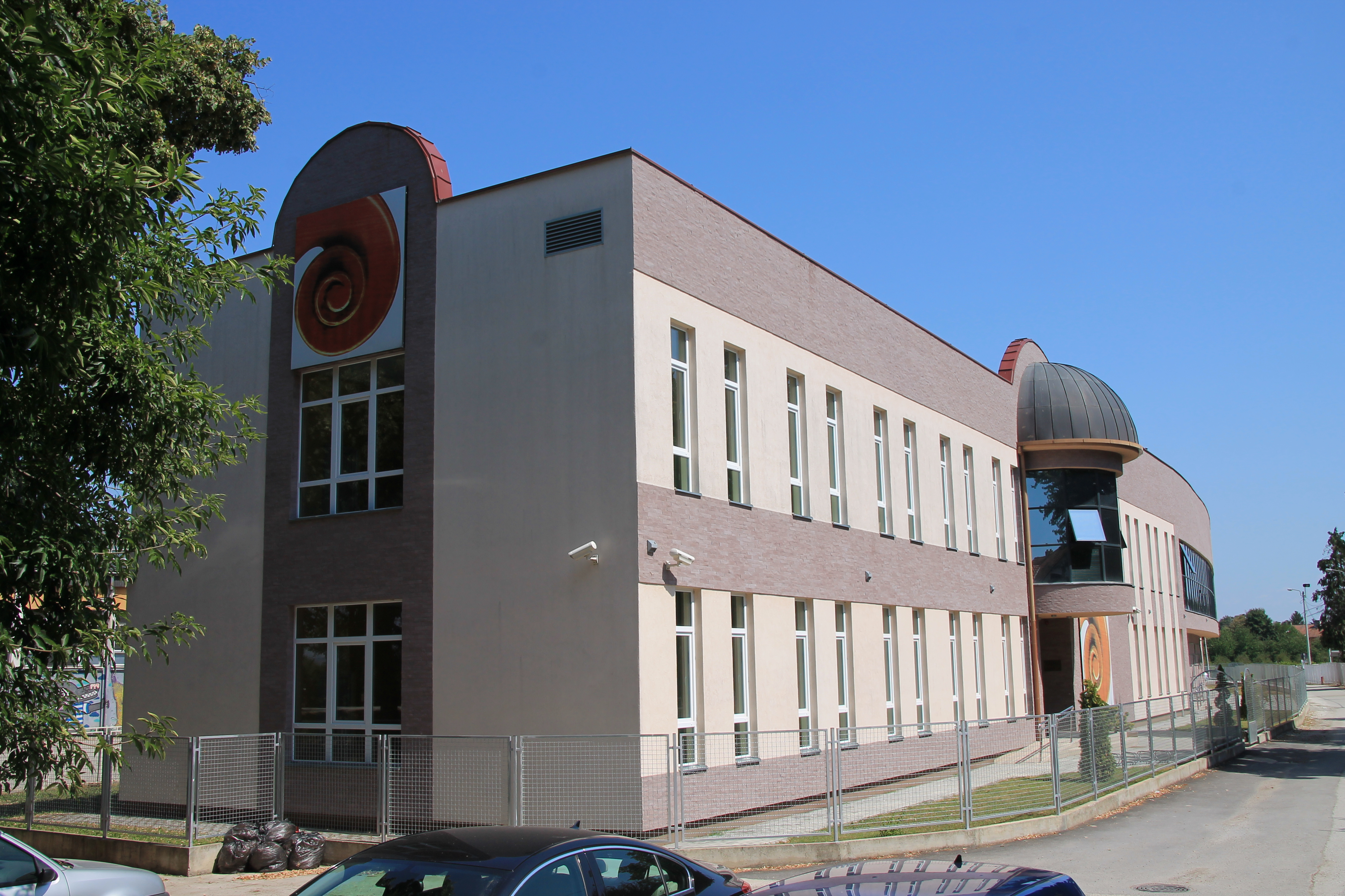 Muzička škola Čačak